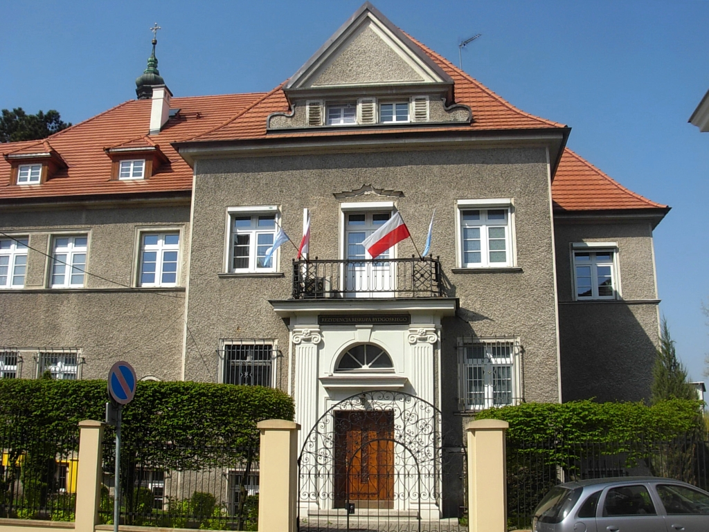 Rezydencja biskupa bydgoskiego przy ul. Tadeusza Skarbek-Malczewskiego